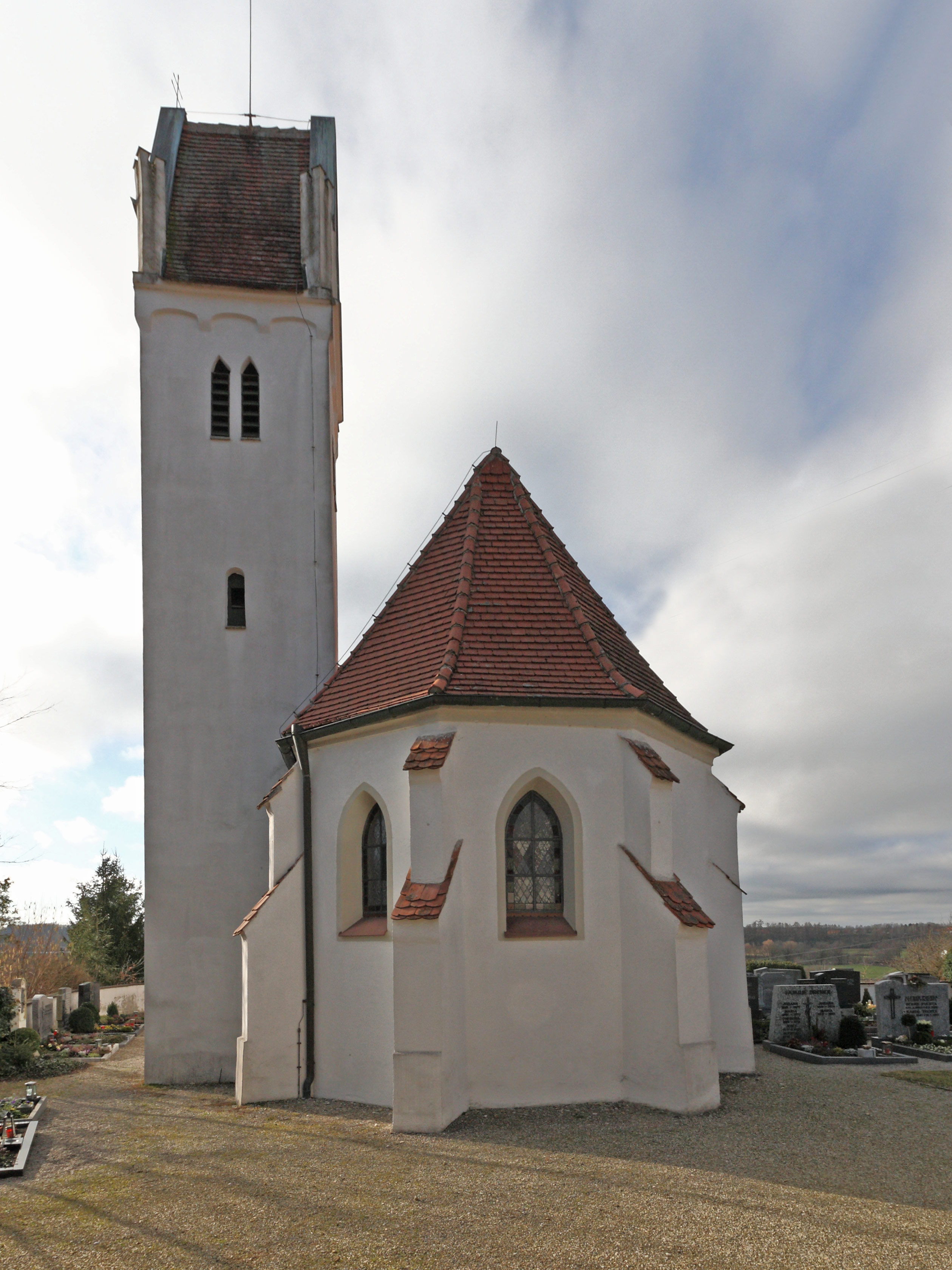 Kath. Filialkirche Sankt Zeno in Oberbleichen; Ostansicht der spätgotischen Kirche